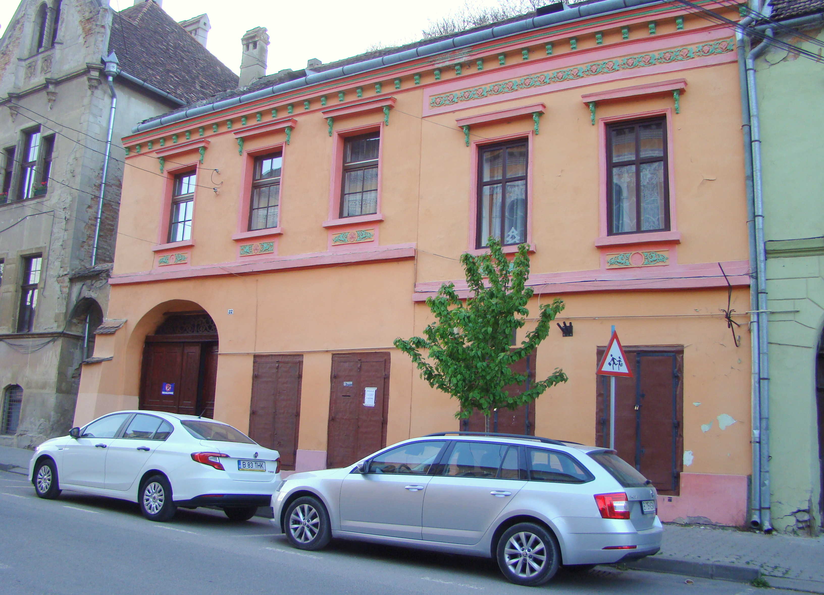 Casă, municipiul Sighișoara, str. Chendi Ilarie 22 1850